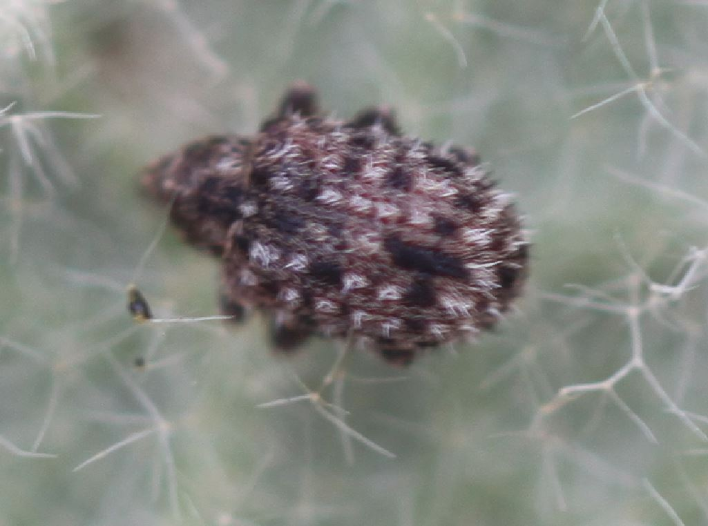 Rüsselkäfer Cleopus solani am 16. Februar 2020 auf der Unterseite eines Grundblattes einer Königskerze am Rheinufer südlich von Mannheim